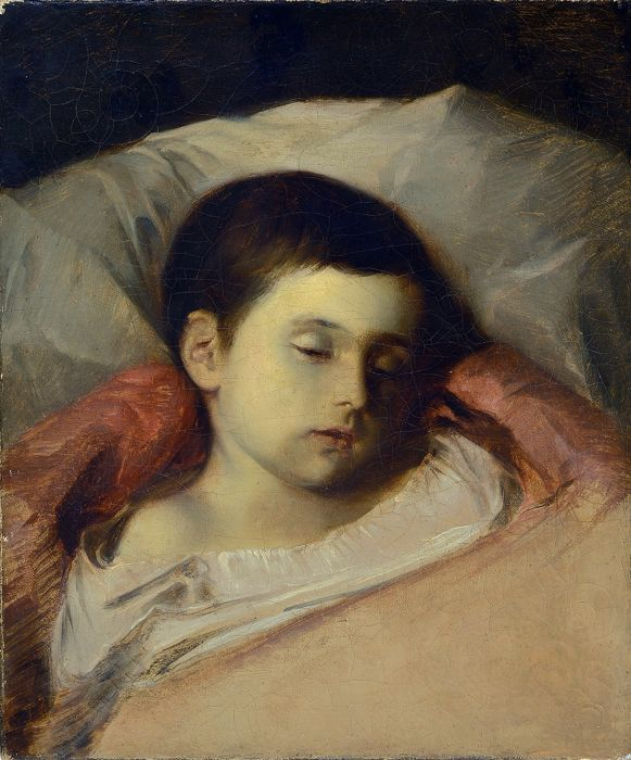 Retrato posiblemente de uno de los hijos de Ivan Kramskoi